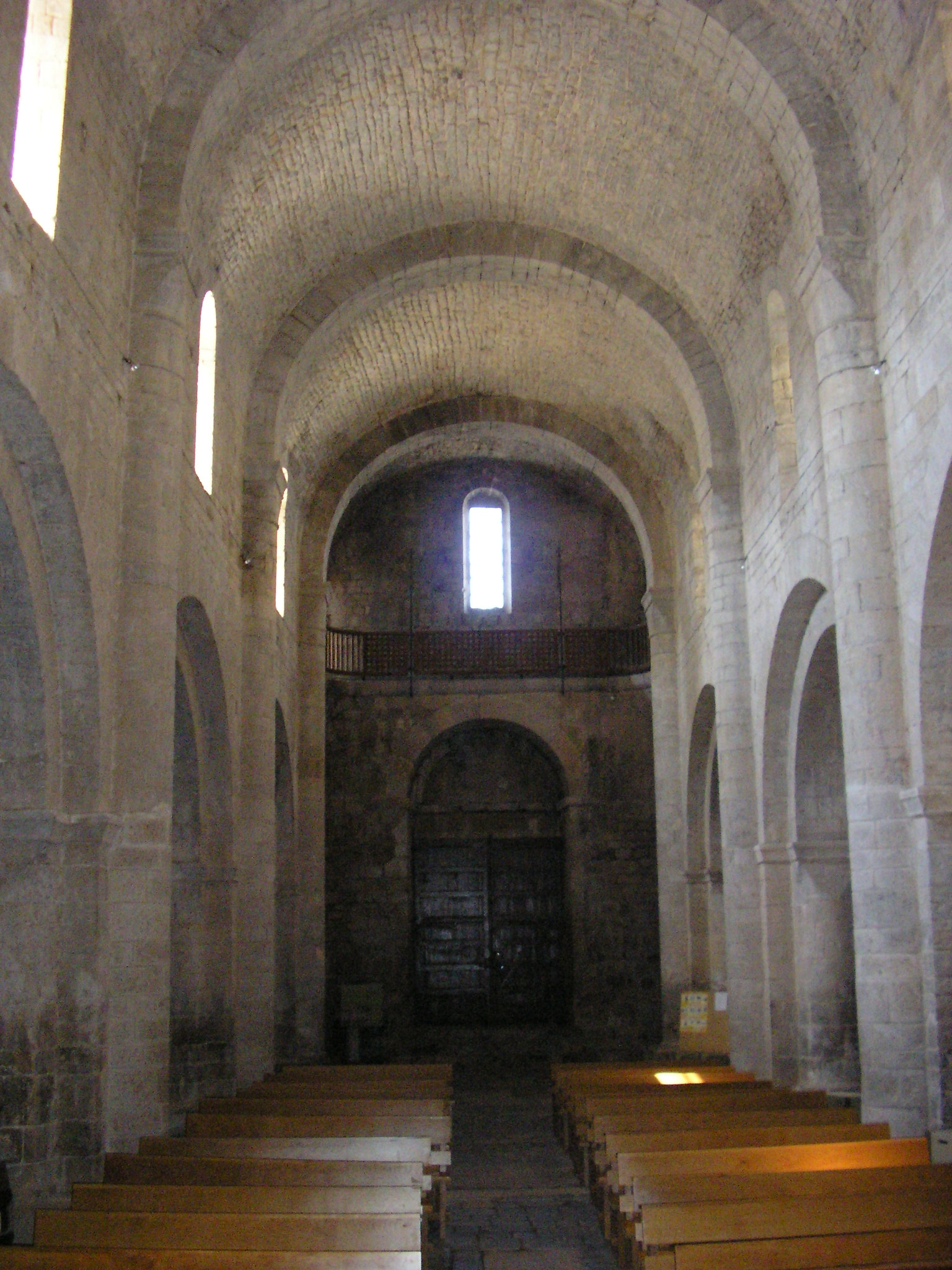 Monasterio de Santa Maria de Vilabertran - Iglesia 2